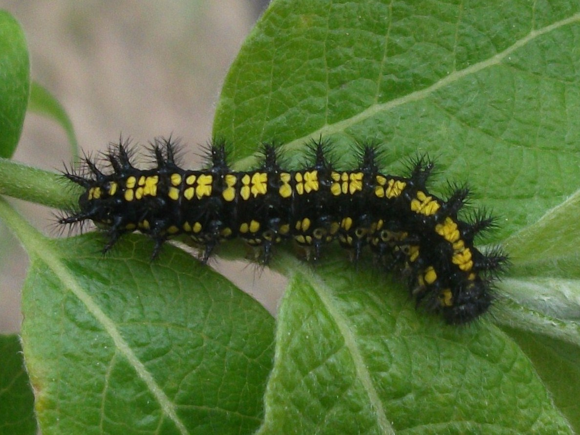 Euphydryas maturna (Linnaeus, 1758)